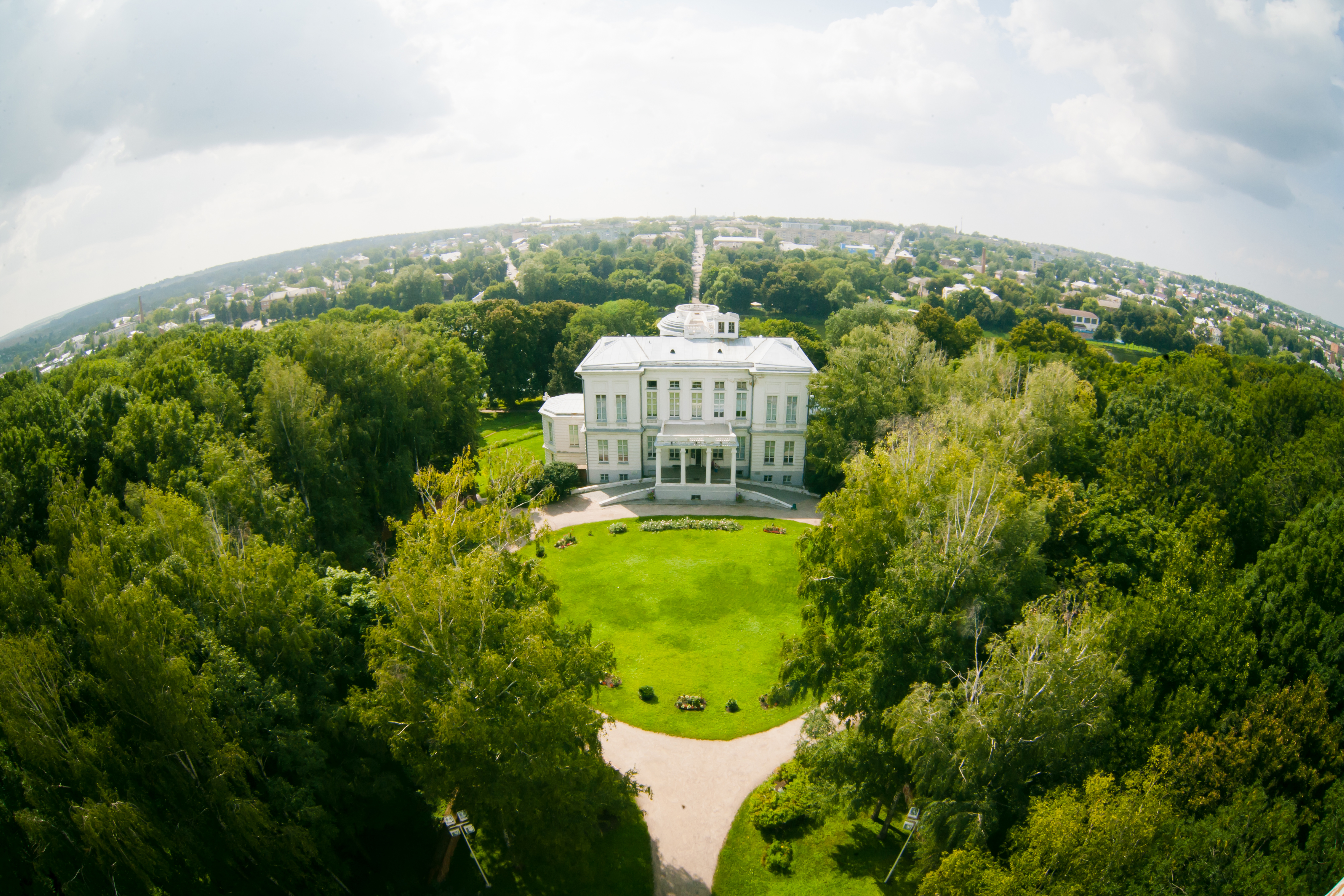 Богородицкий исторический парк им. А.Т.Болотова, Богородицкий район This image is related to the protected area of Russia number 7110016